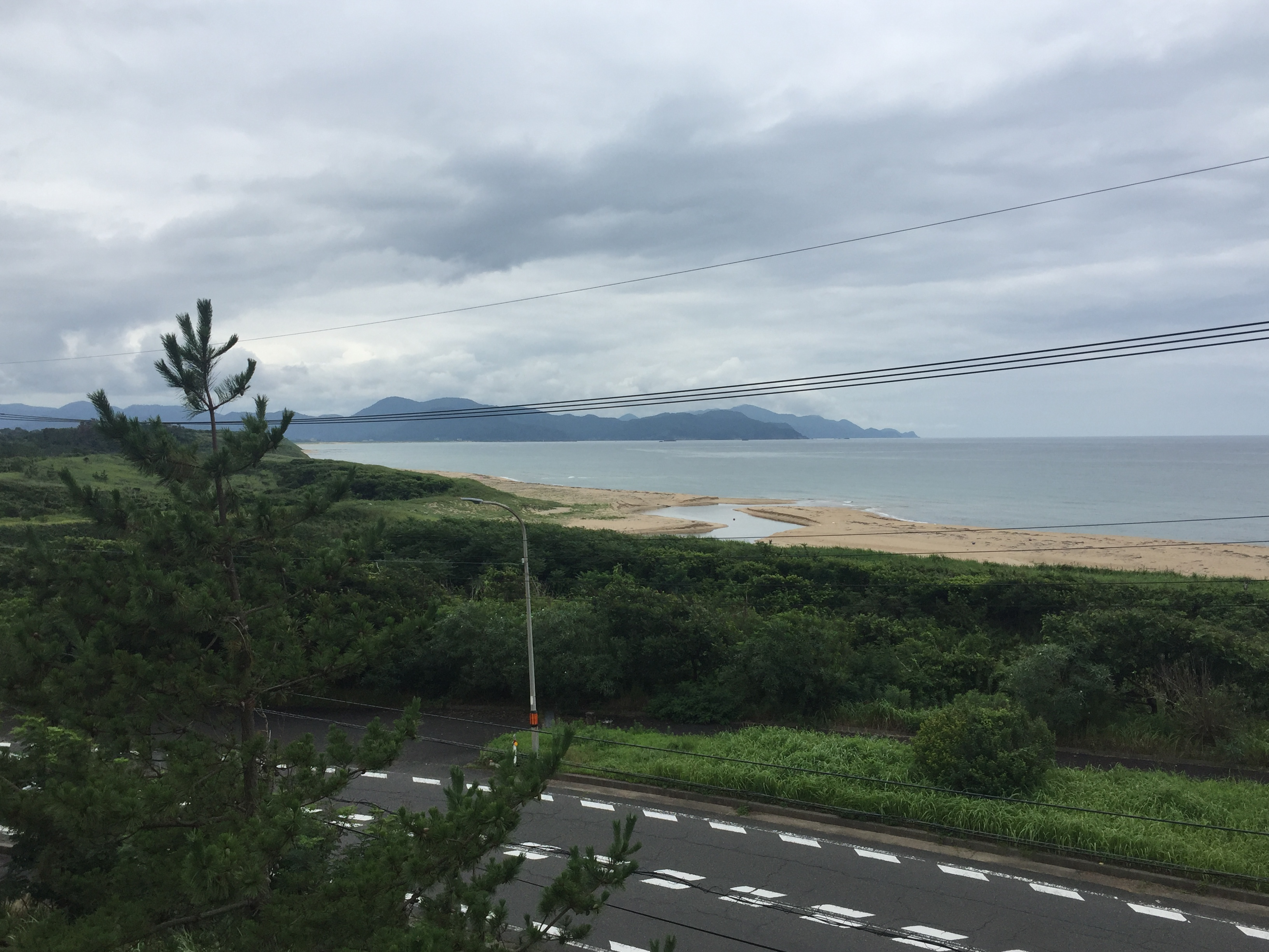 浜詰川河口付近の海岸